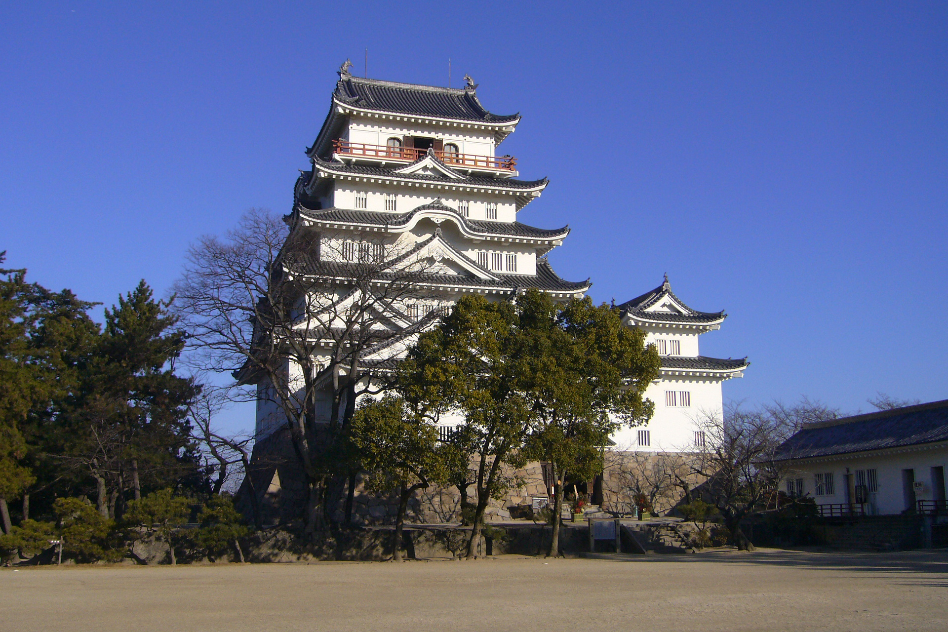 Fukuyama Castle "Tenshu" in Fukuyama, Hiroshima prefecture, Japan